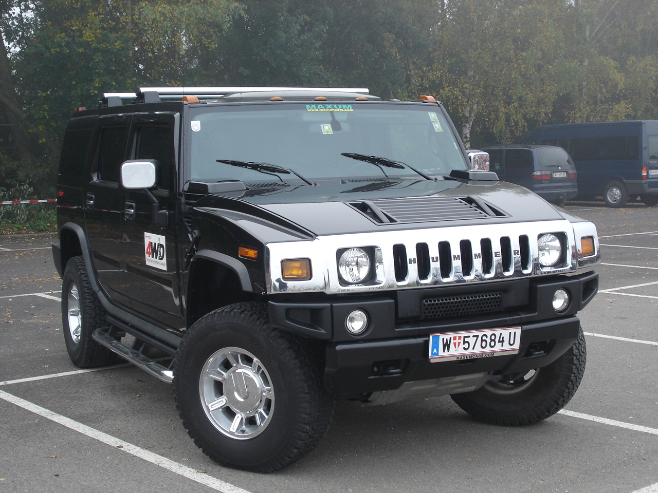 Front eines Hummer H2 in Österreich